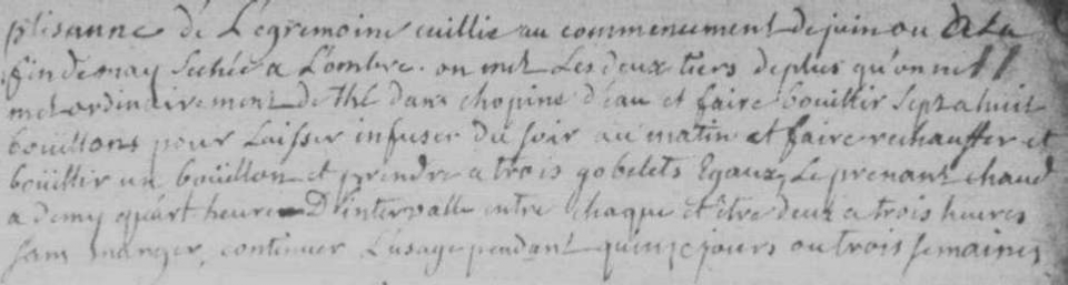 Recette d'une tisane d'aigremoine : "Tisane de l'aigremoine cueillie au commencement de juin ou à la fin de mai séchée à l'ombre. On met les deux tiers de plus qu'on met ordinairement de thé dans chopine d'eau et faire bouillir sept à huit bouillons pour laisser infuser du soir au matin et faire réchauffer et bouillir un bouillon et prendre à trois gobelets égaux. Le prenant chaud à demi quart d'heure d'intervalle entre chaque et entre deux à trois heures sans manger, continuer l'usage pendant quinze jours ou trois semaines."